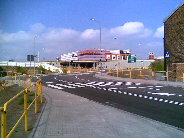 ulica Johna Baildona w Katowicach - widok na centrum handlowe Silesia City Center zza ulicy Chorzowskiej